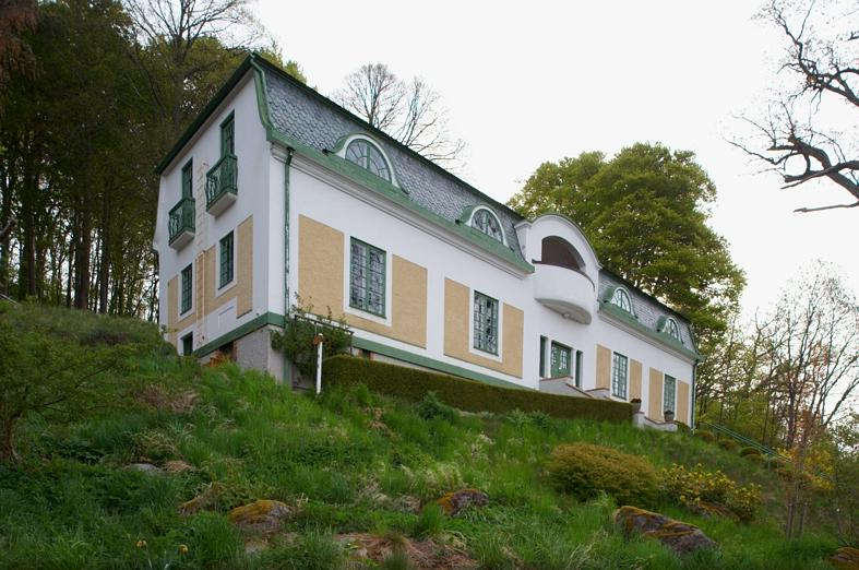 Författarinnan Ellen Key¿s (1849-1926) hem från 1911 och fram till sin död. Huset ligger strandnära i en brant sluttning ned mot Vättern. Det var Ellens svåger göteborgsarkitekten Yngve Rasmussen som ritade och uppförde huset 1910-1911. Motiv: Ombergs Kronopark 1:2 Nyckelord: Byggnadsminnen, Naturreservat, Riksintressen Kategori: Museum, Bostadshus Författarinnan Ellen Key¿s (1849-1926) hem från 1911 och fram till sin död. Huset ligger strandnära i en brant sluttning ned mot Vättern. Det var Ellens svåger göteborgsarkitekten Yngve Rasmussen som ritade och uppförde huset 1910-1911. Ombergs Kronopark 1:2.